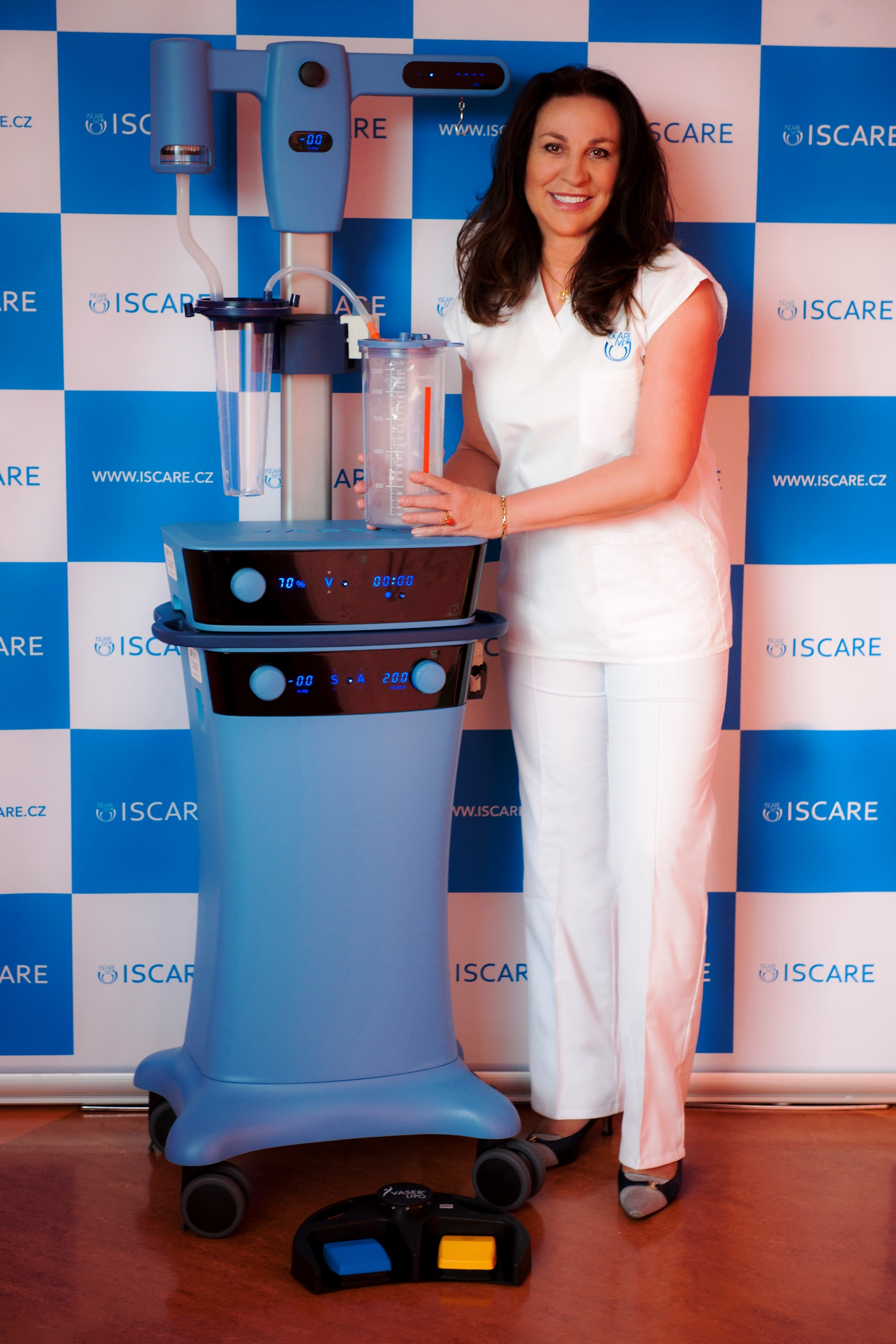 ilustrační foto ISCARE